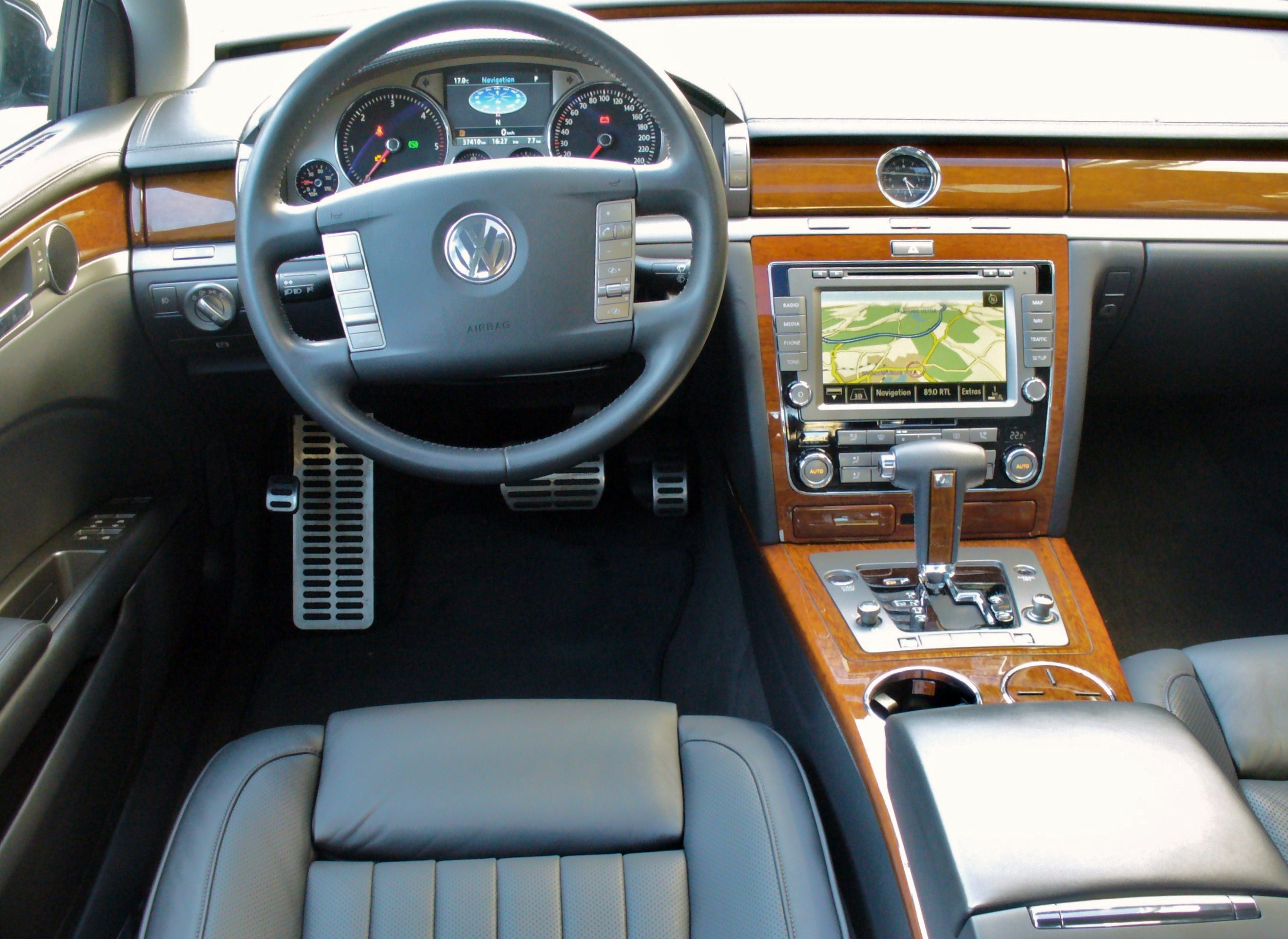 VW Phaeton